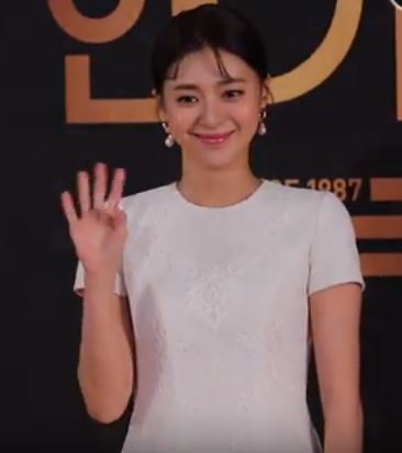 12월 31일 오후 서울시 영등포구 여의도 KBS 신관 웨딩홀에서 '2019 KBS 연기대상' 레드카펫 행사가 열려 여배우 김세정, 신도현, 윤진이, 이영은, 정유민, 하재숙이 참석해 포토타임을 갖고 있다.